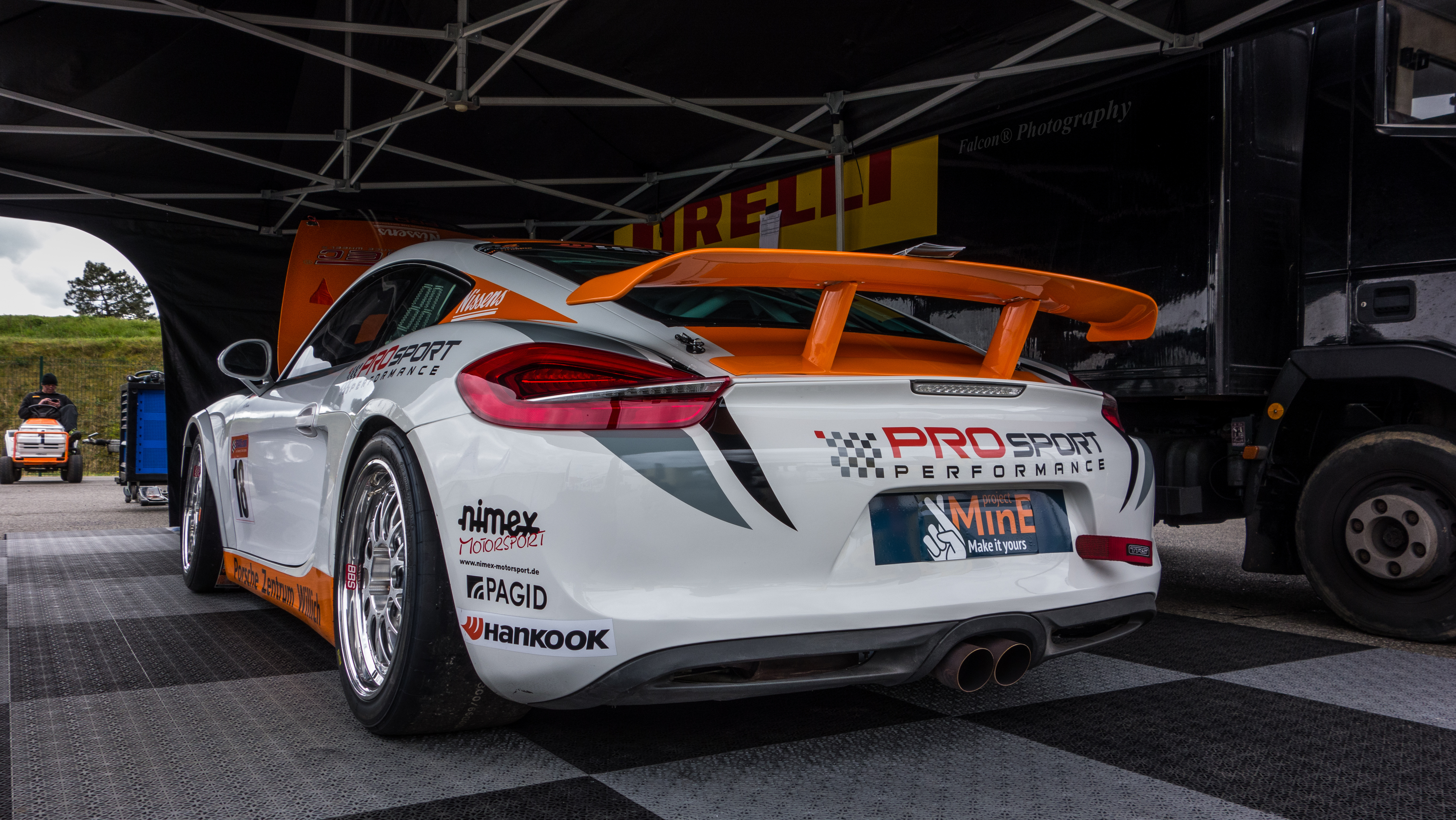 385hp